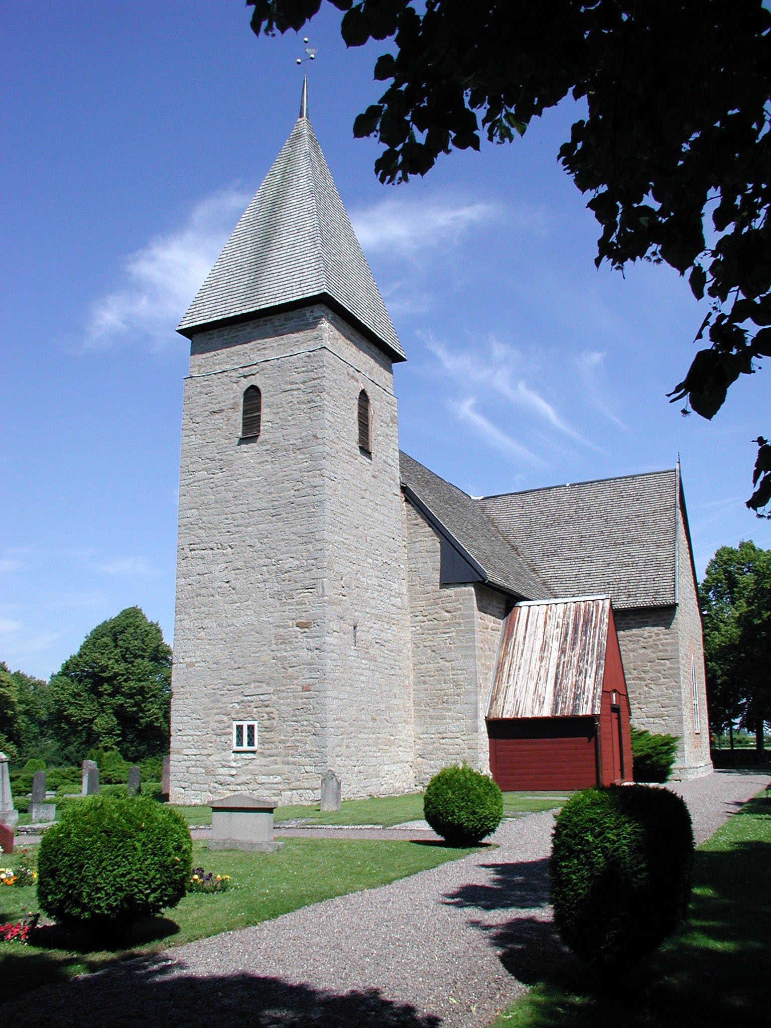 Rogslösa kyrka.